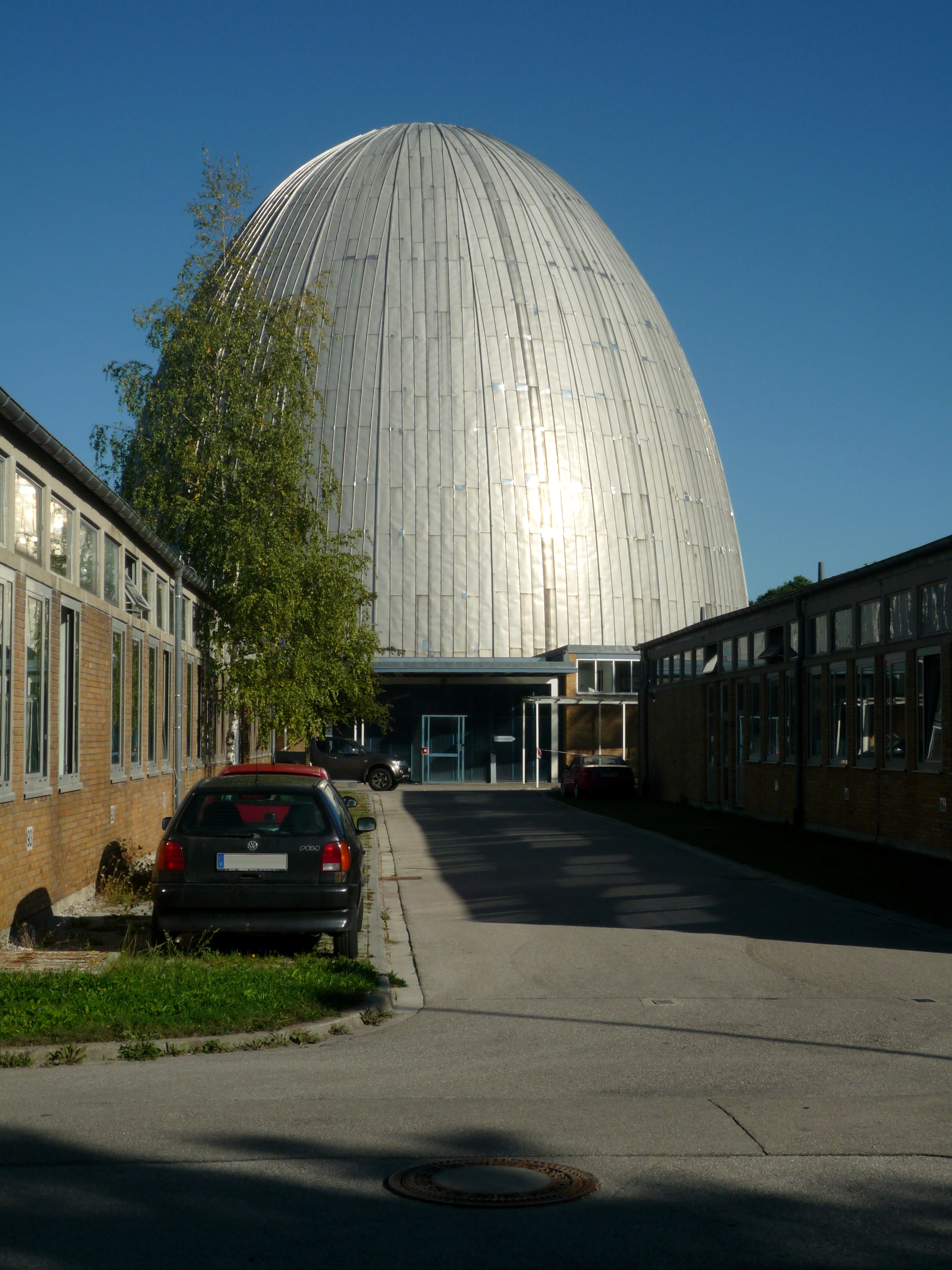 Forschungsreaktor München; Lichtenbergstraße 1; Denkmalnummer 313341; Aktennummer D-1-84-119-13